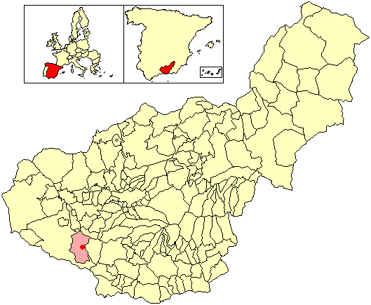 Situación de la Entidad de Ámbito Territorial Inferior al Municipio (EATIM) de Fornes (en el municipio de Arenas del Rey) respecto a la provincia de Granada, en España.